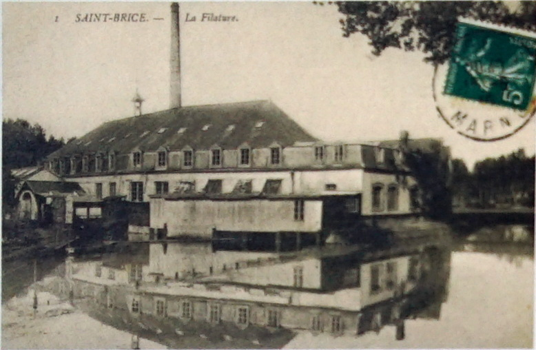 sur une carte ostale du début du XXe siècle.